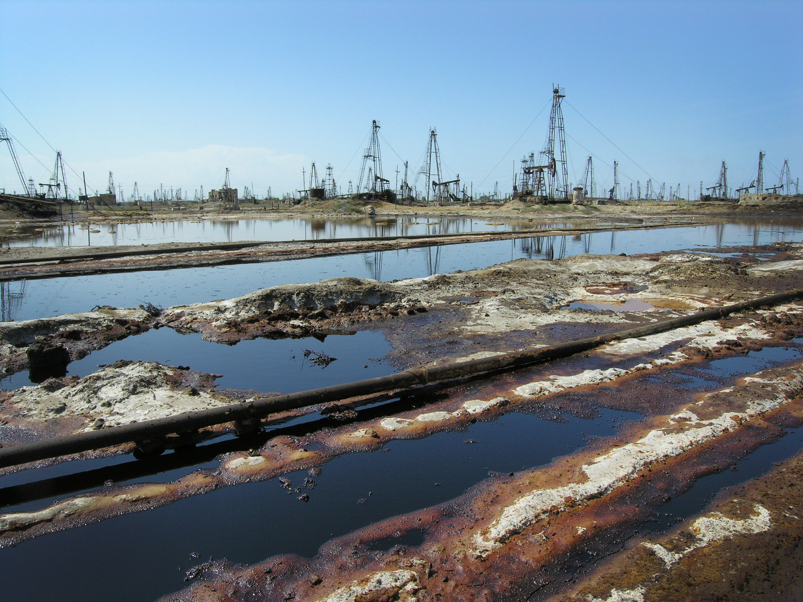 Ramana Oil Field